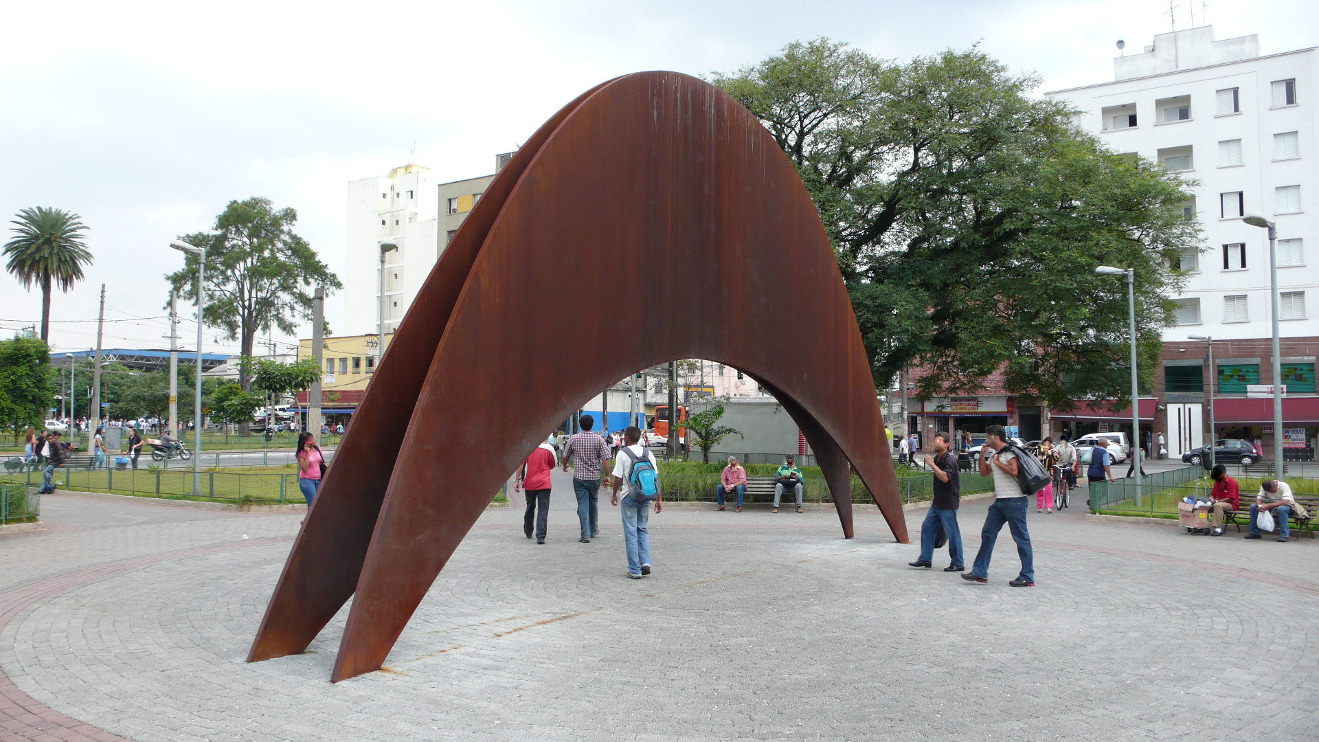 Monumento ao Migrante Nordestino